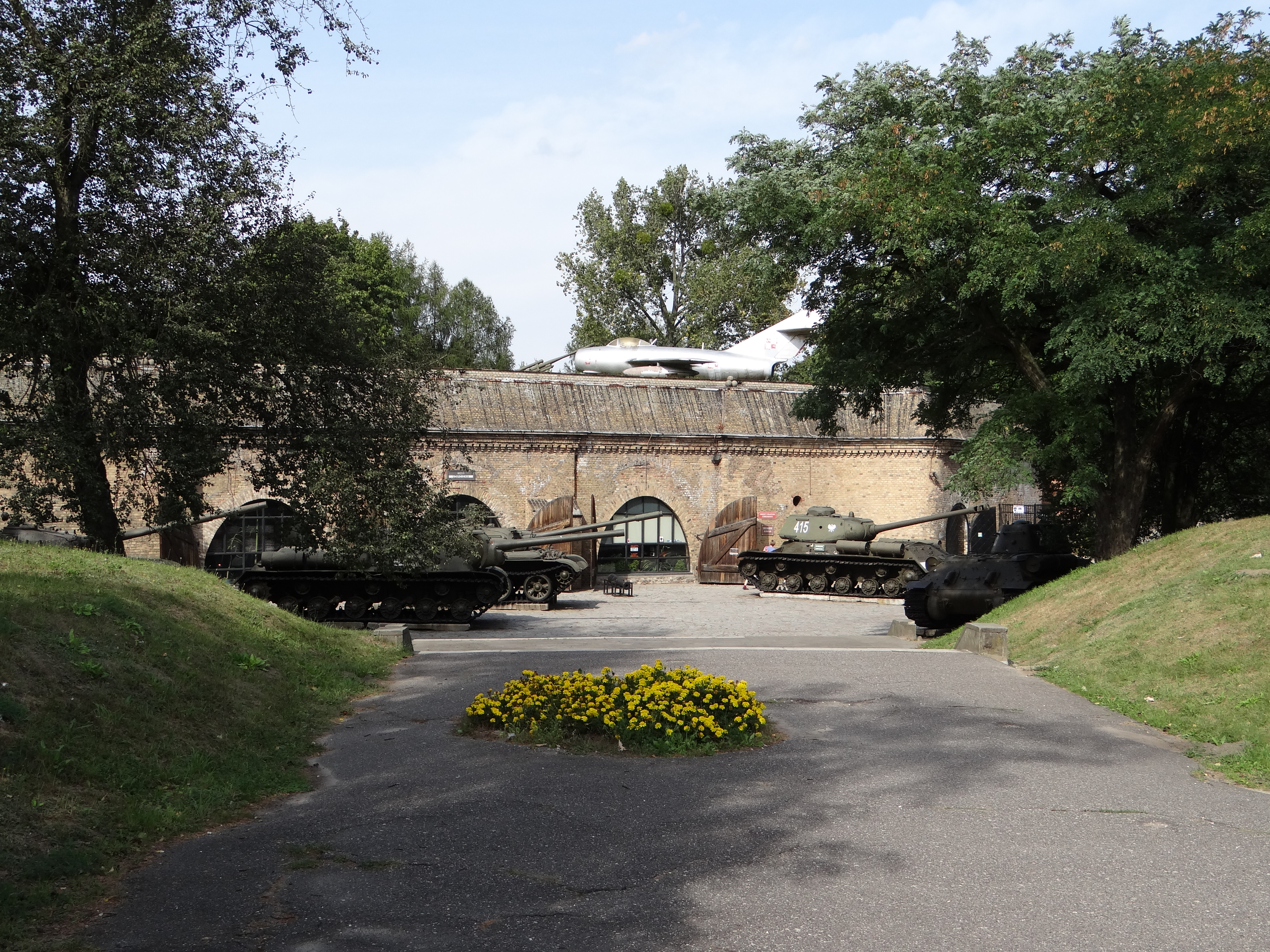 Poznań, ul. Armii Poznań - cytadela z parkiem i cmentarzami (zabytek ne A 006)